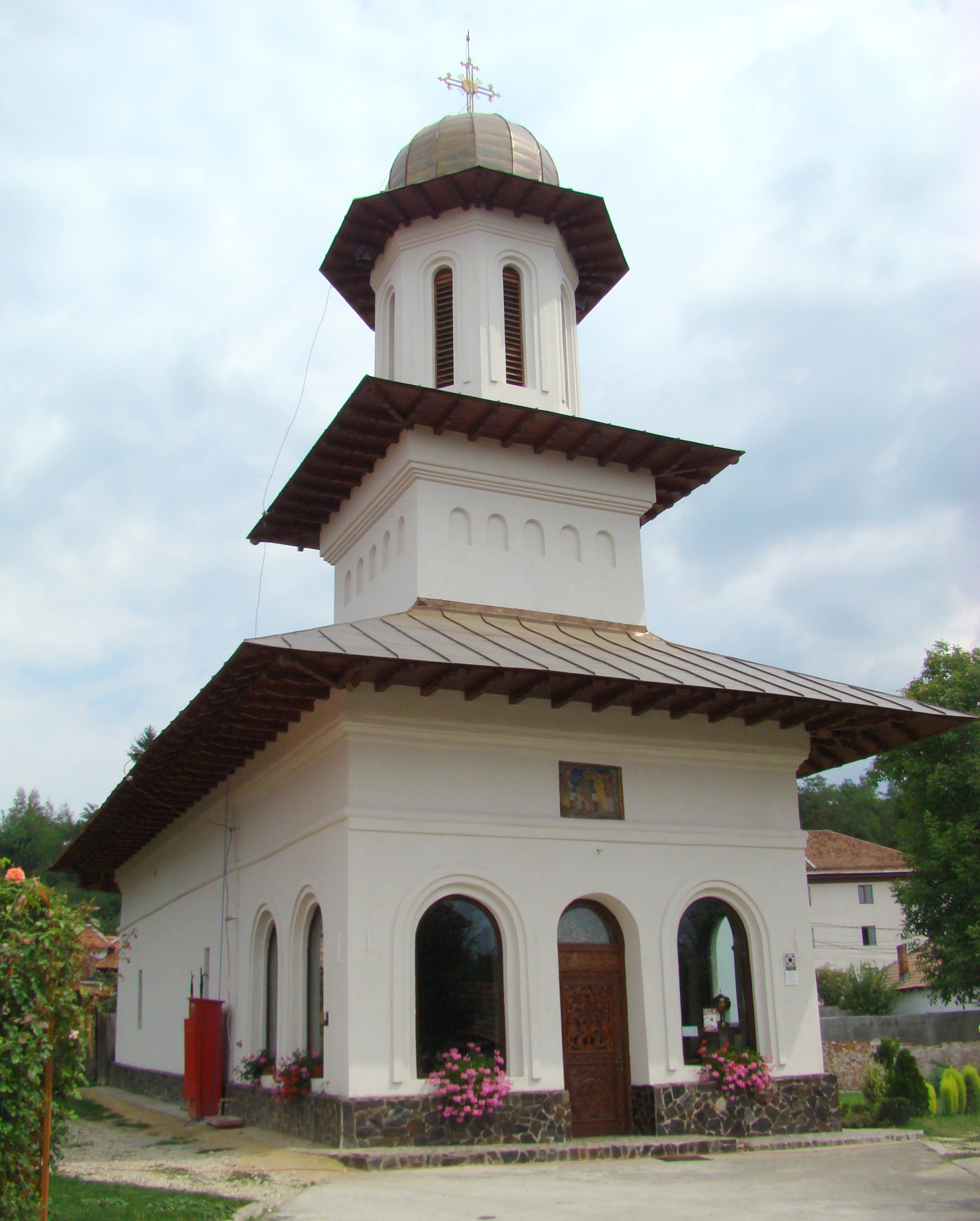 Biserica "Intrarea în Biserică a Maicii Domnului"-Brad-Bătușari, municipiul Curtea de Argeș, Str. Vlaicu Vodă 8